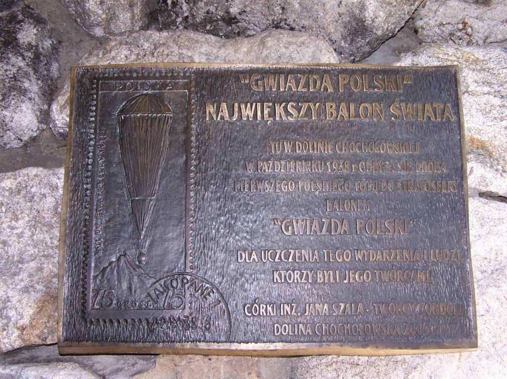 Schronisko PTTK na Polanie Chochołowskiej